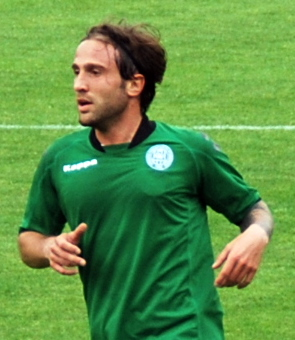 Fodboldspilleren Valentino Lai fra Viborg FF. Her i 1. divisionskampen mod FC Roskilde på Viborg Stadion.